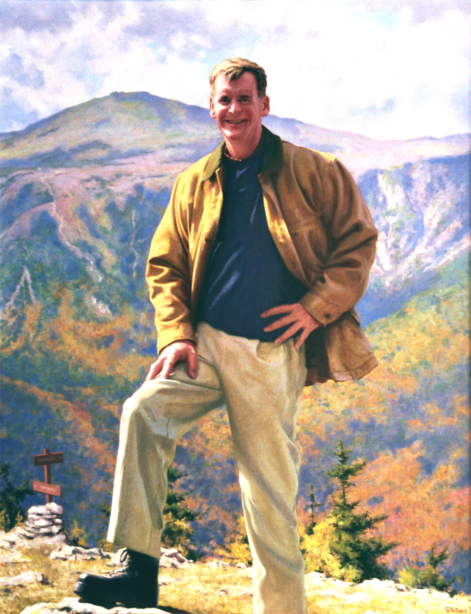 Judd Alan Gregg